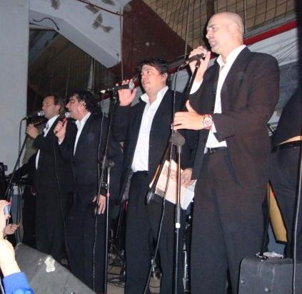 Miguel, Yesty, Fabián y Gerardo de la banda de música tropical uruguaya Karibe con k.